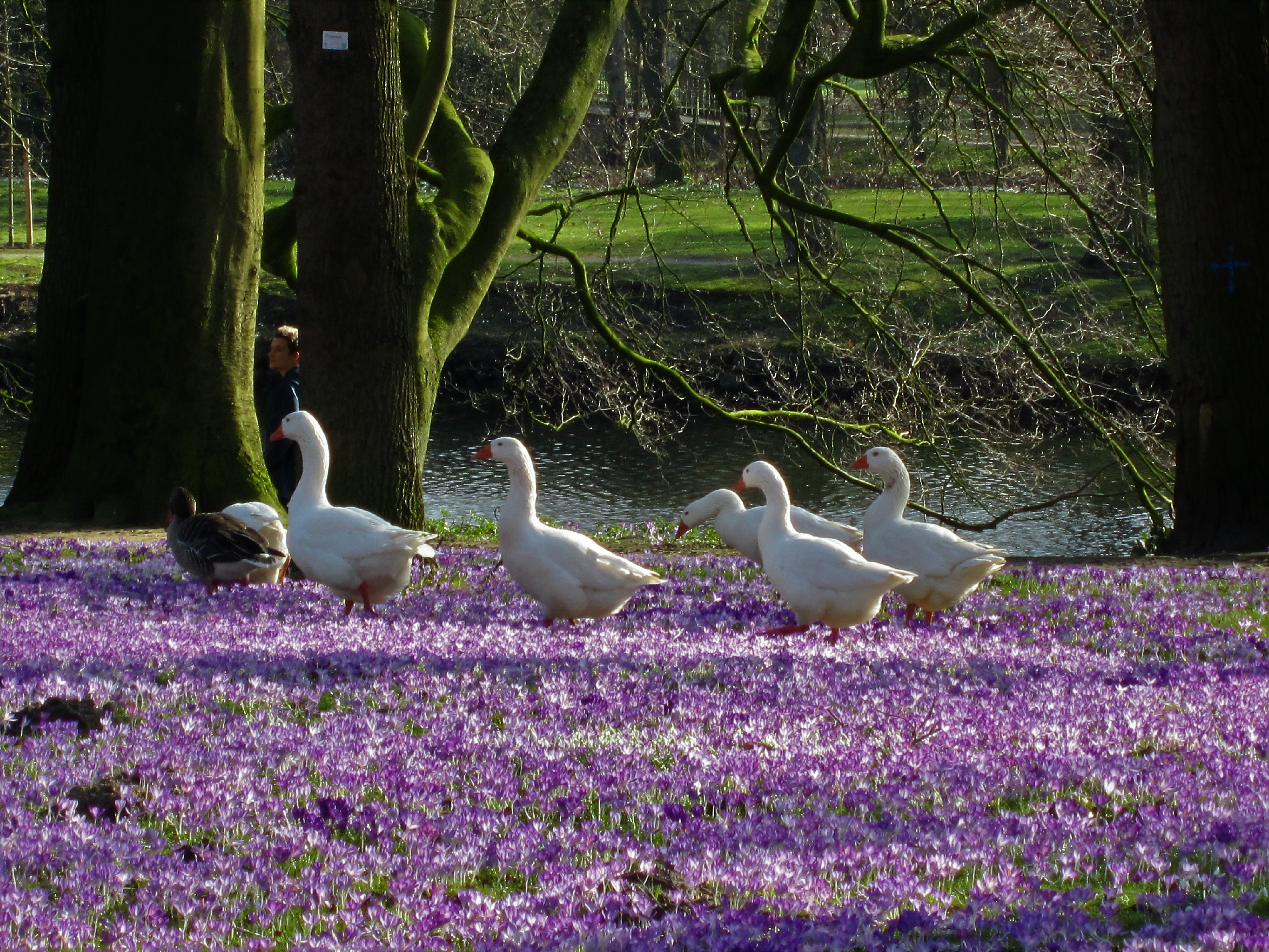 Gänse auf der Burginsel Delmenhorst inmitten blühender Krokusse